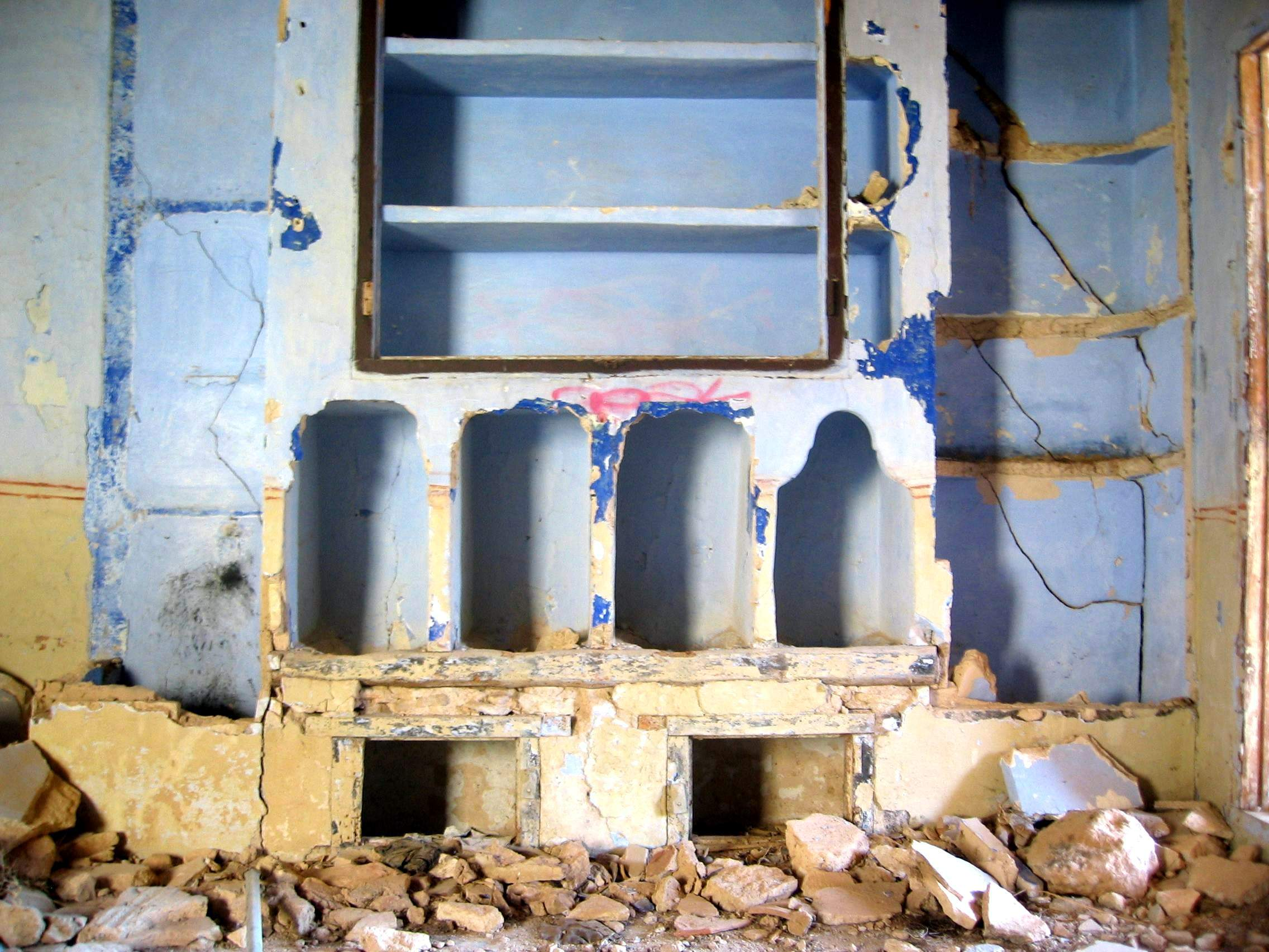 Detalle de alacena y cantarera arruinadas en una casa de La Balsa, Ademuz